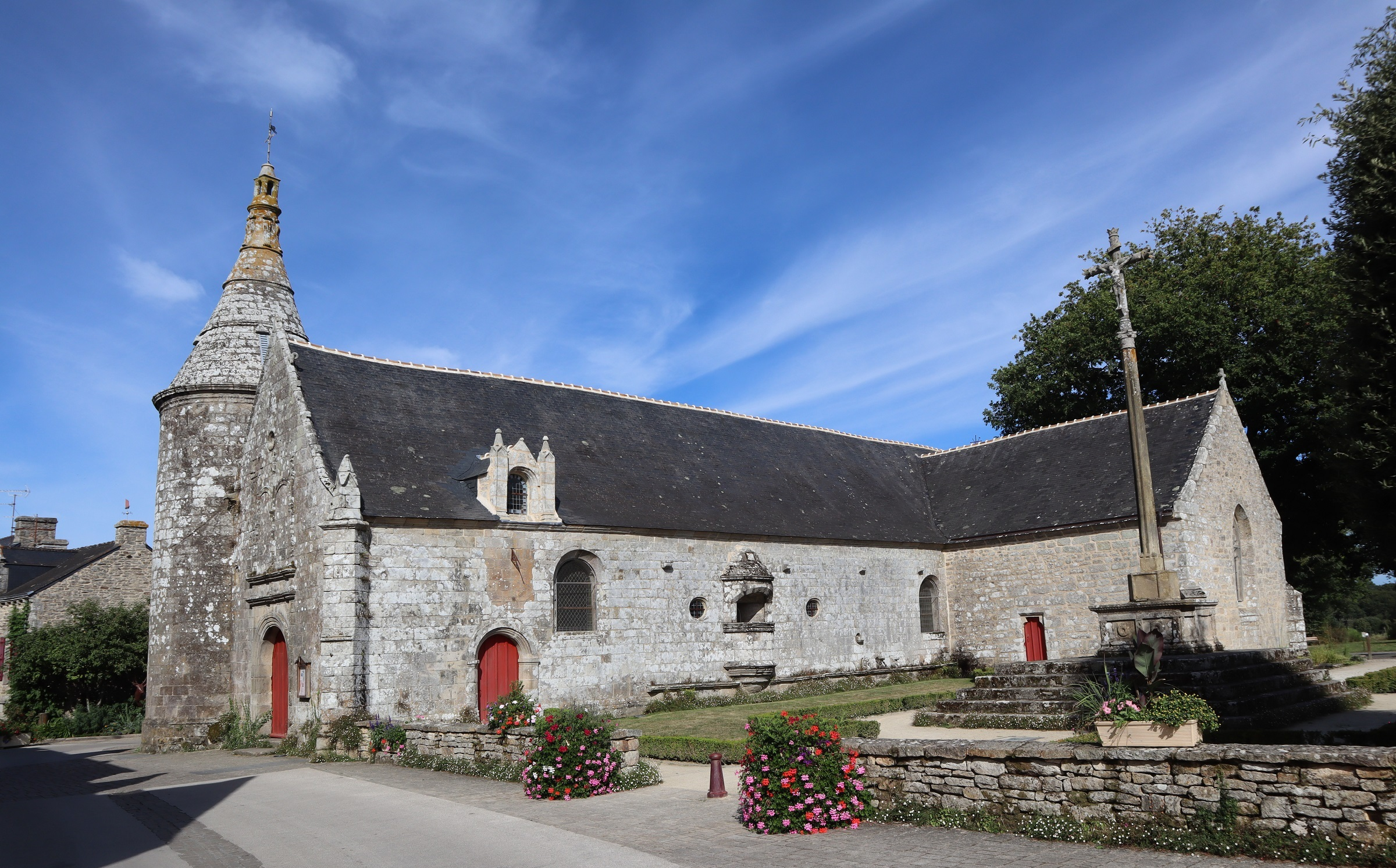 Extérieur de l'église Sainte-Anne au Guerno (56). Vue méridionale.